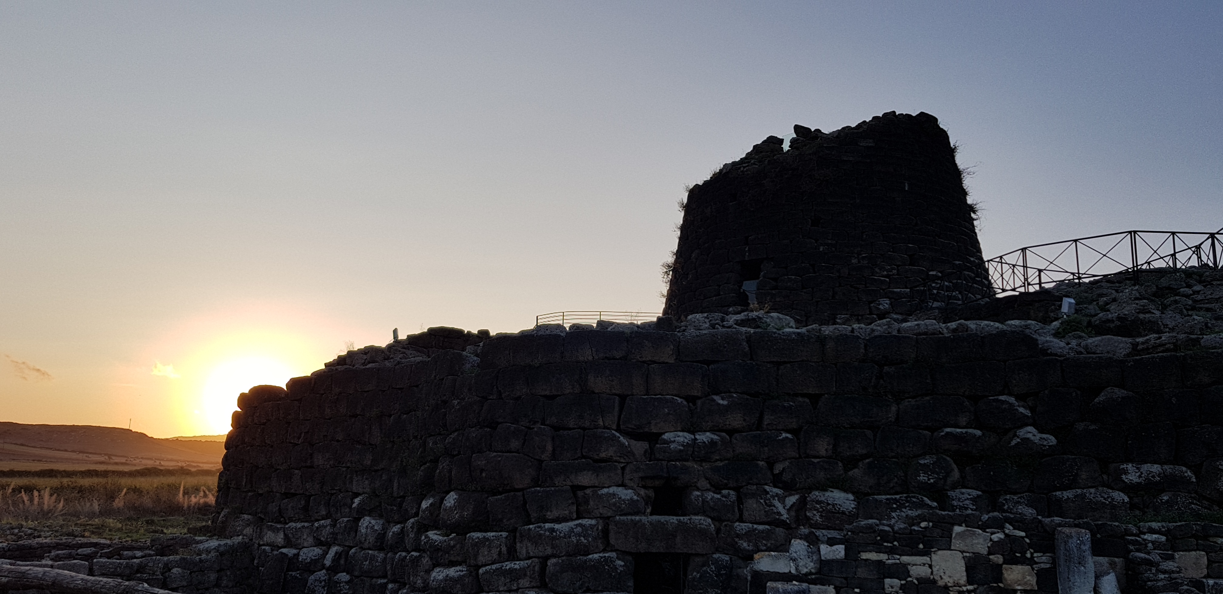 Nuraghe Santu Antine This is a photo of a monument which is part of cultural heritage of Italy.